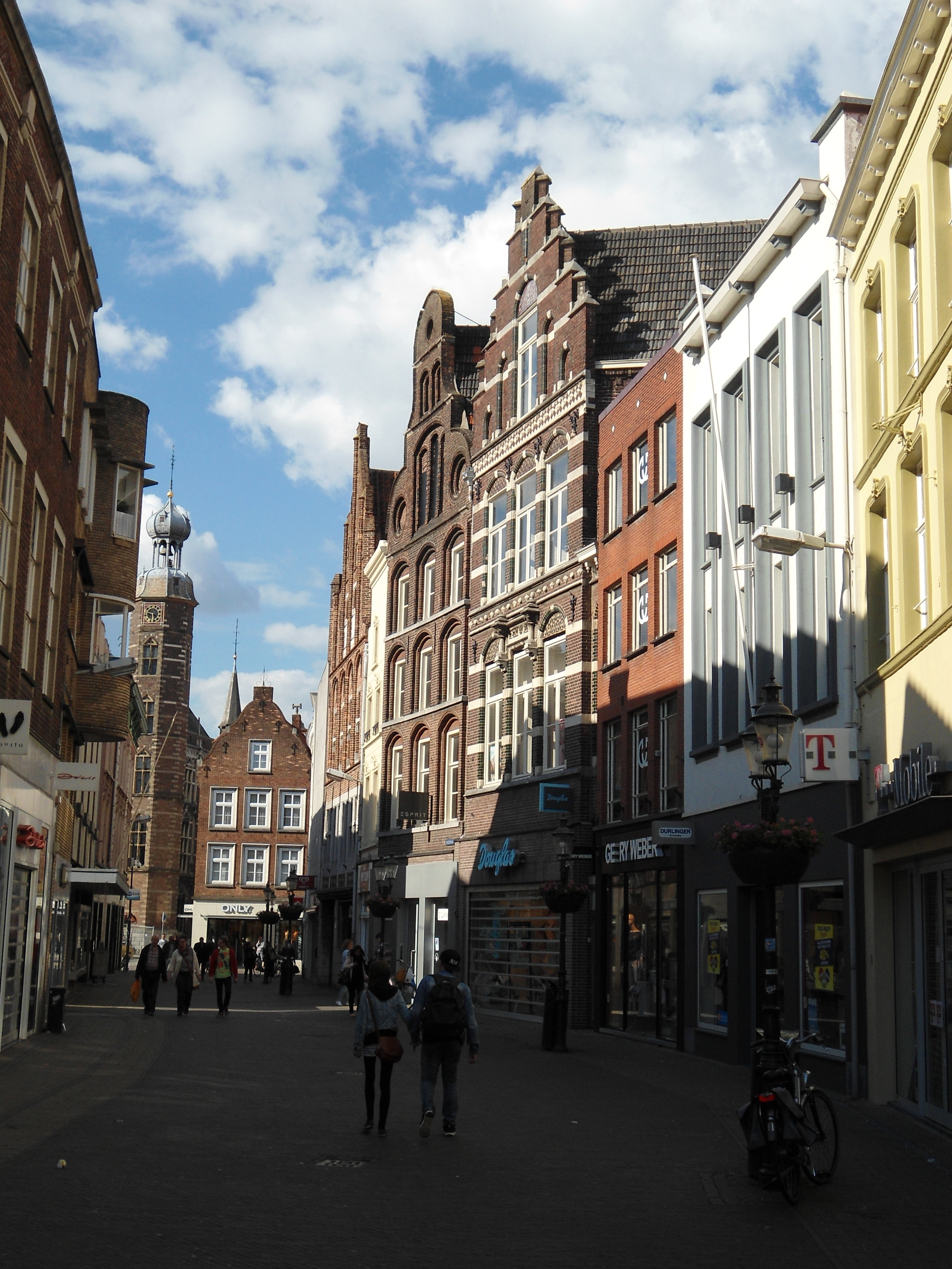 Vleesstraat naar de Markt toe gezien